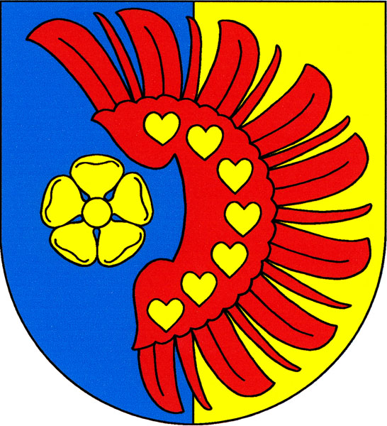 Znak obce Ratiboř (okres Jindřichův Hradec)